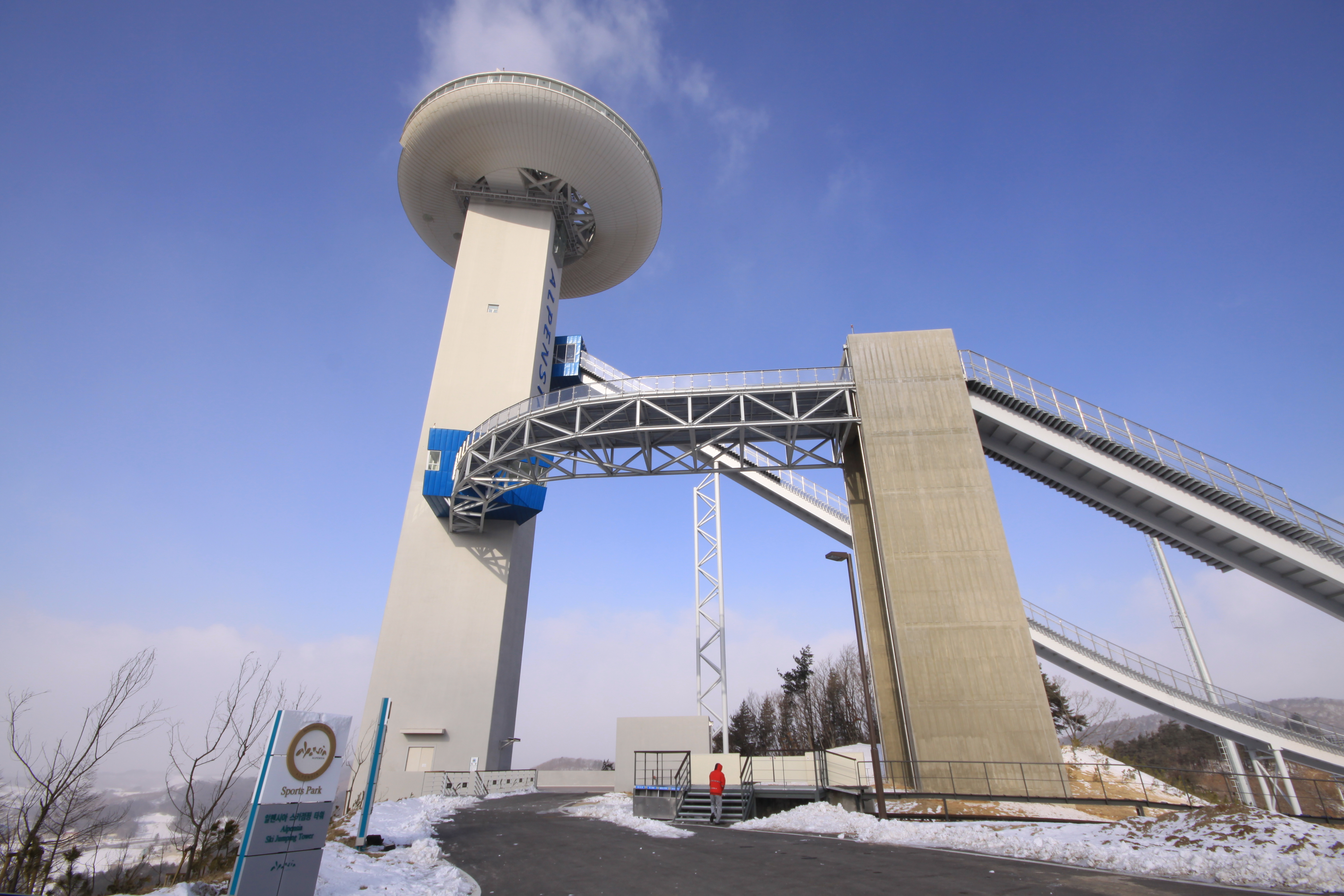 알펜시아 스키 점프대